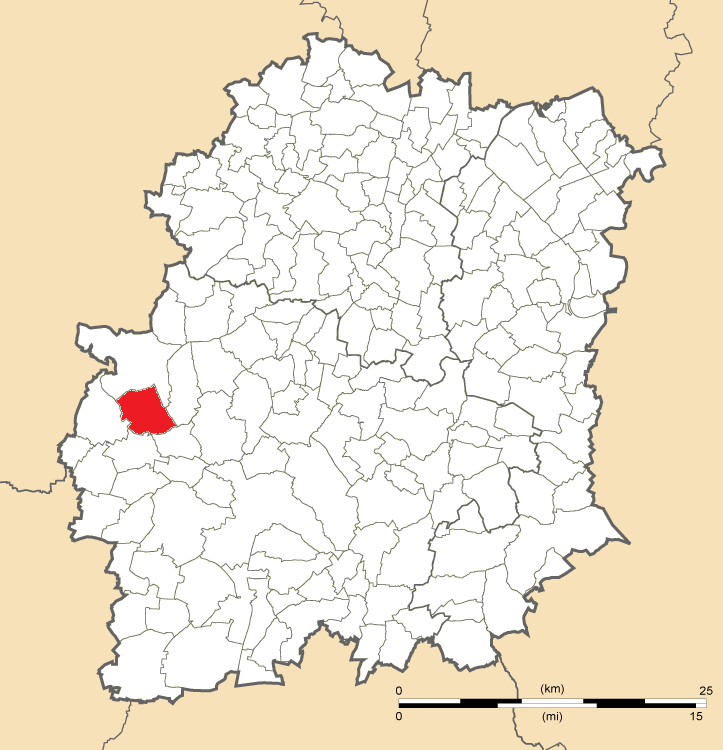 Carte de position des Granges-le-Roi en Essonne (91)